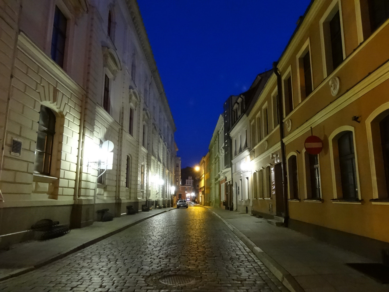 Ulica Jezuicka w Bydgoszczy